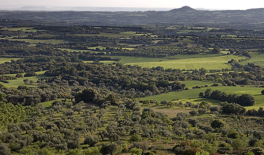 Imatge feta des del Tossal d'Hoz de Barbastre. Al darrere i al mateix nivell es pot veure el Monestir del Pueyo